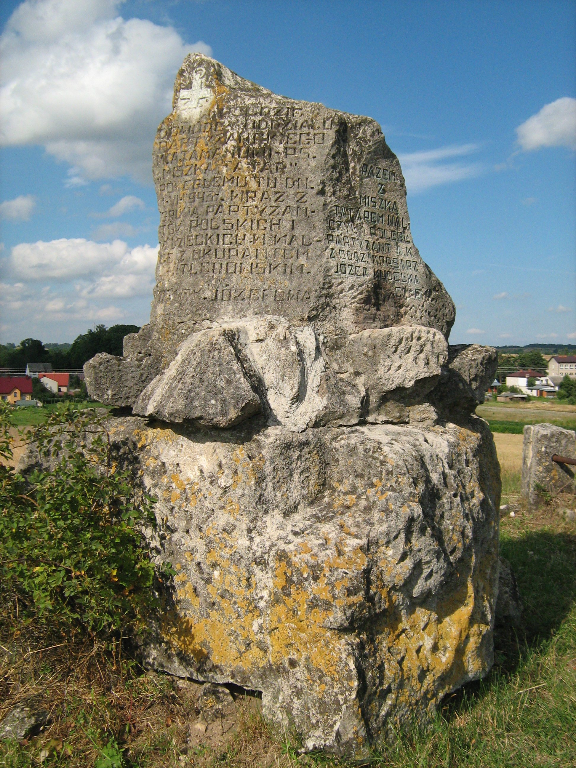 Pomnik w miejscu śmierci "Miszki Tatara" - Józefów, pow. Biłgoraj.